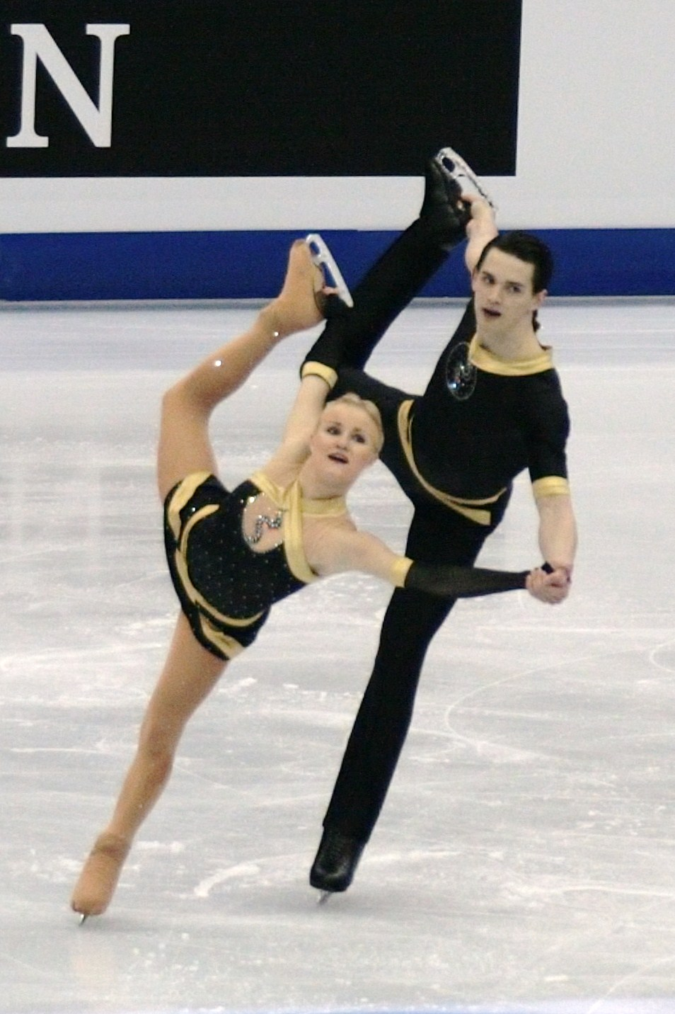 Анаис Моранд и Тимоти Лееман на чемпионате мира по фигурному катанию 2012